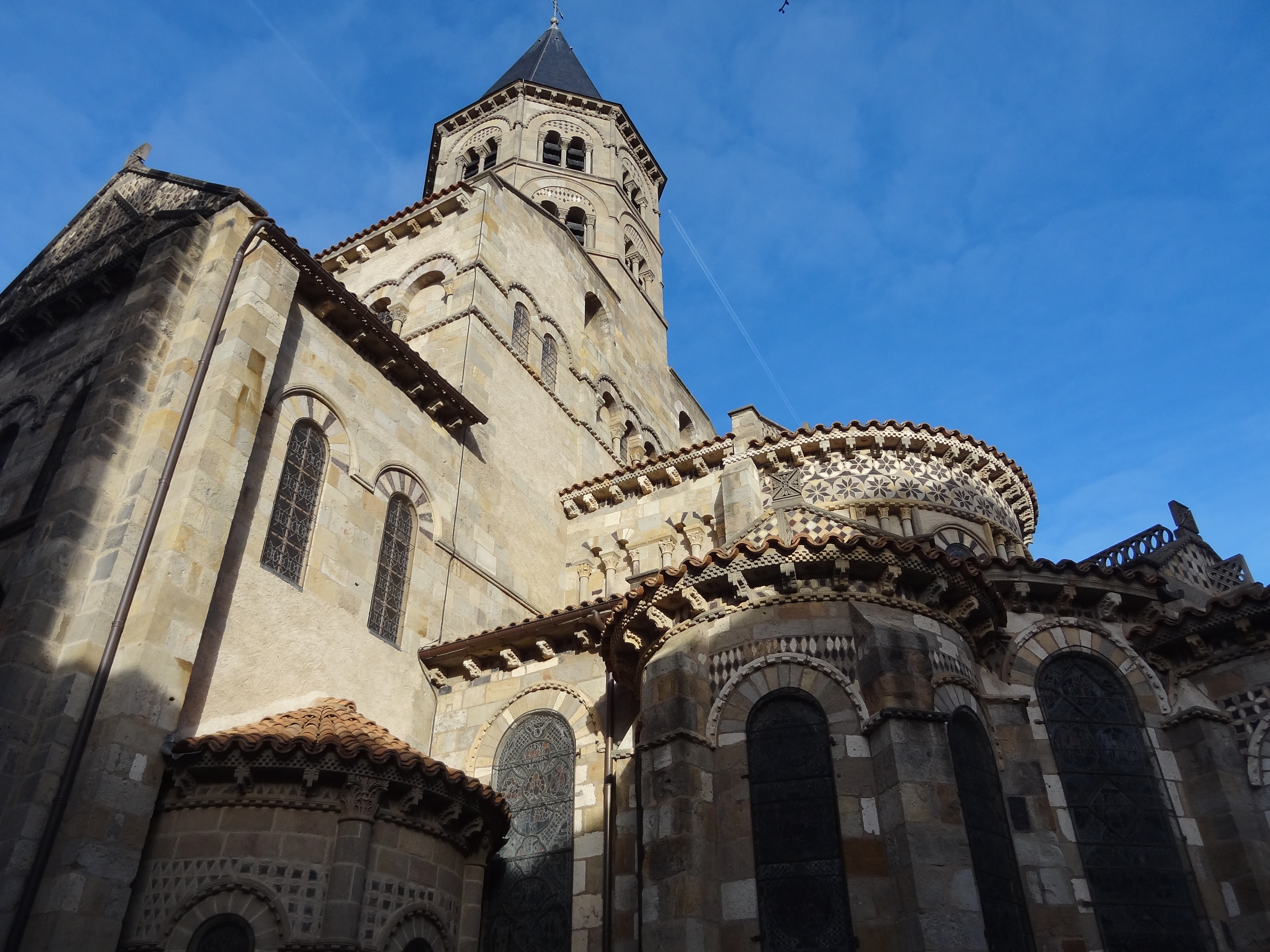 cette photo réprésente la face est de la basilique (chevet) restauré récemment et caractéristique des églises romanes de la région - basilique classée au patrimoine mondial de l'UNESCO en 1998